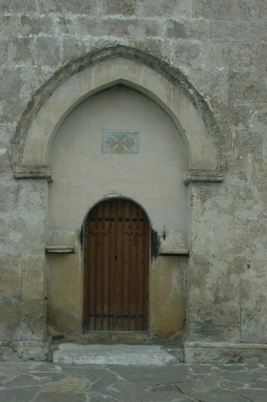 Boczne wejście do świątyni we wsi Nidż (Nic, Nij) w Azerbejdżanie. Wieś zamieszkują głównie Udini -chrześcijanie.